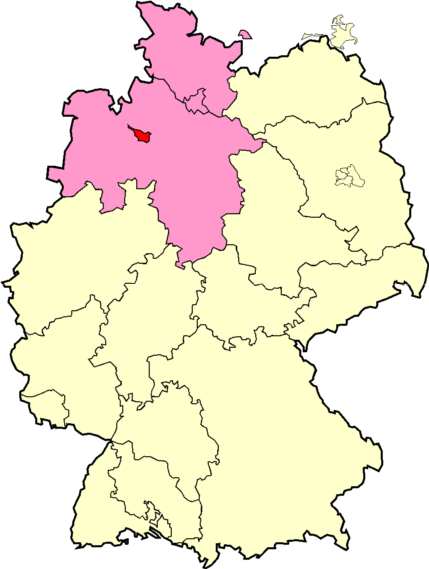 Logo de la BFV au sein de la NFV Catégorie:Football en Allemagne